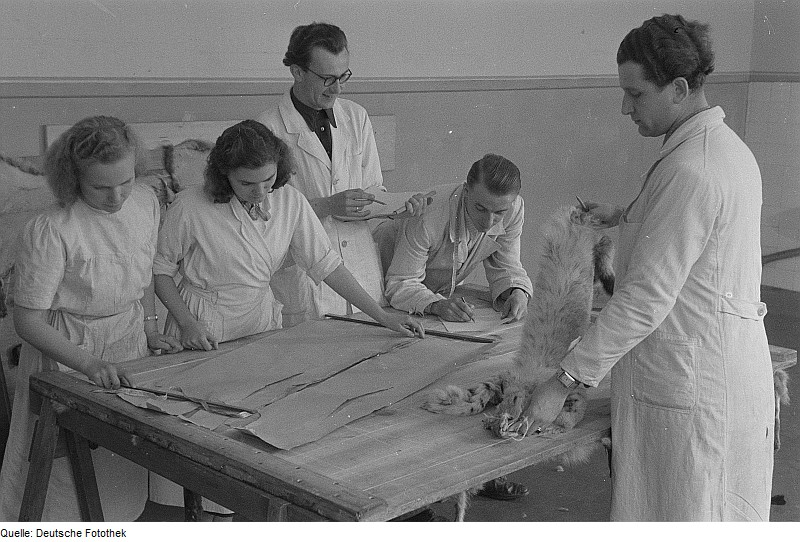 Original image description from the Deutsche FotothekUnterricht in der Kürschnerschule